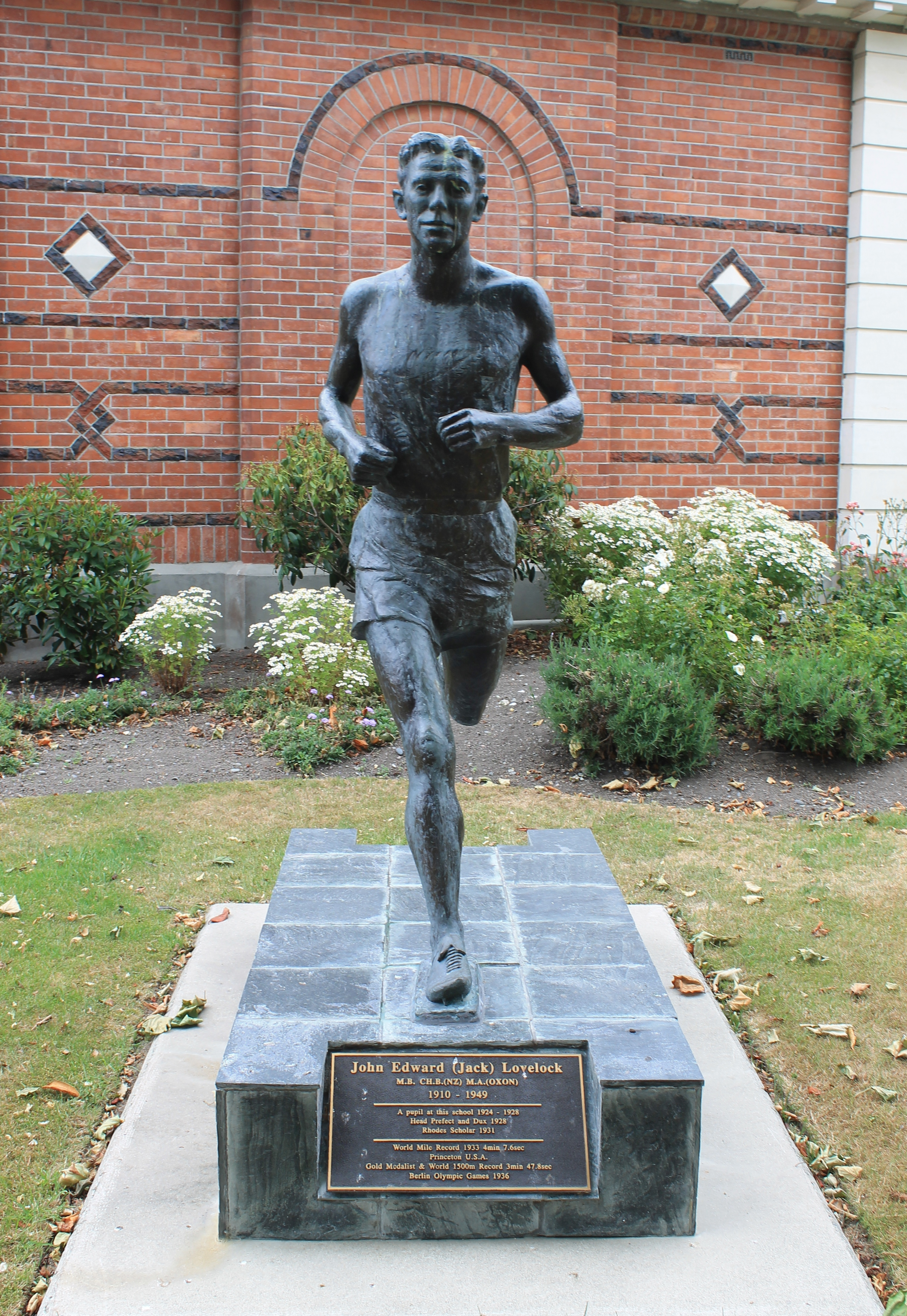 Statue des Olympiasiegers Jack Lovelock, Timaru Boys Colleage, Timaru NZ